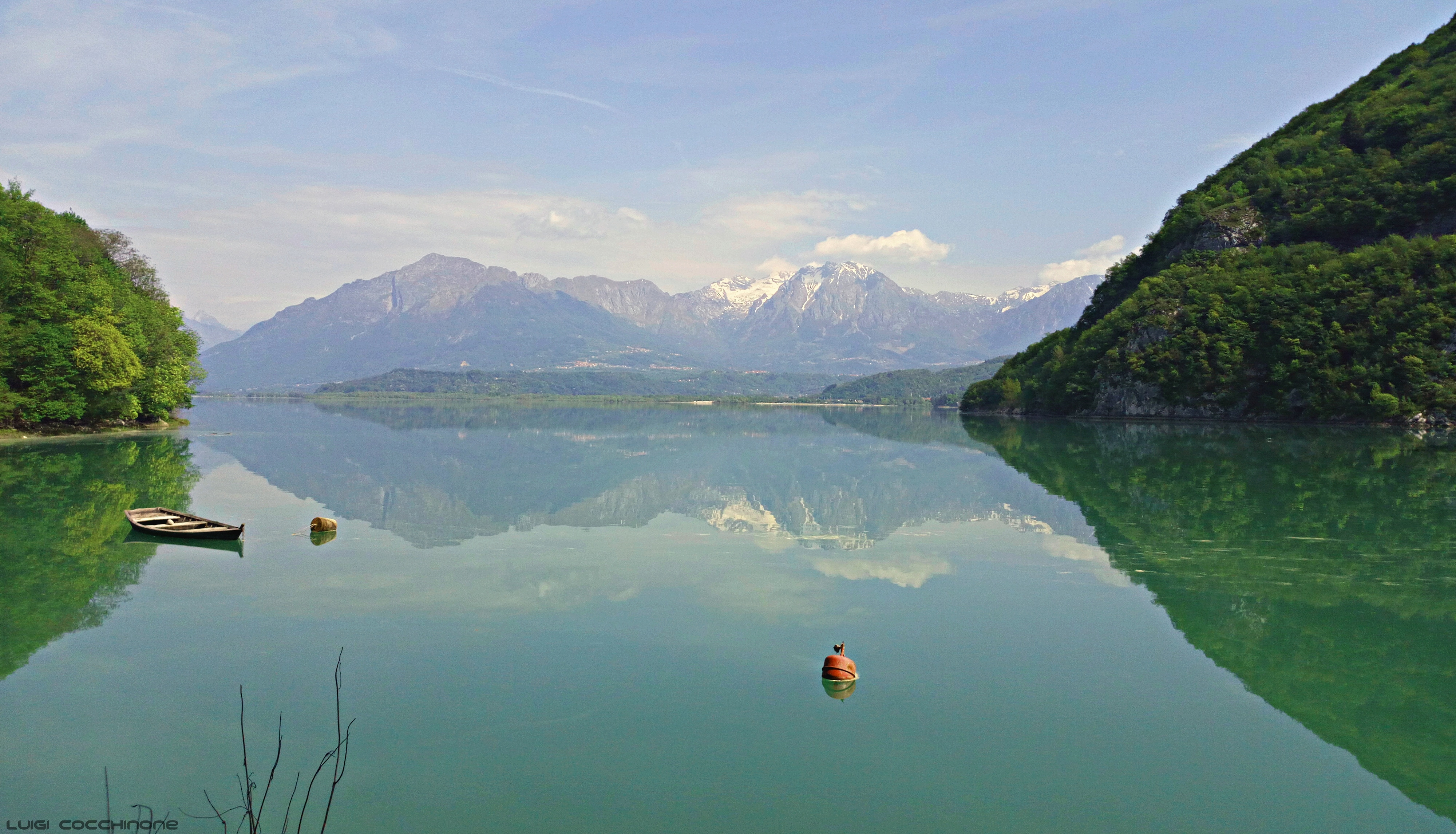 Lago di Santa Croce (Q49963632)